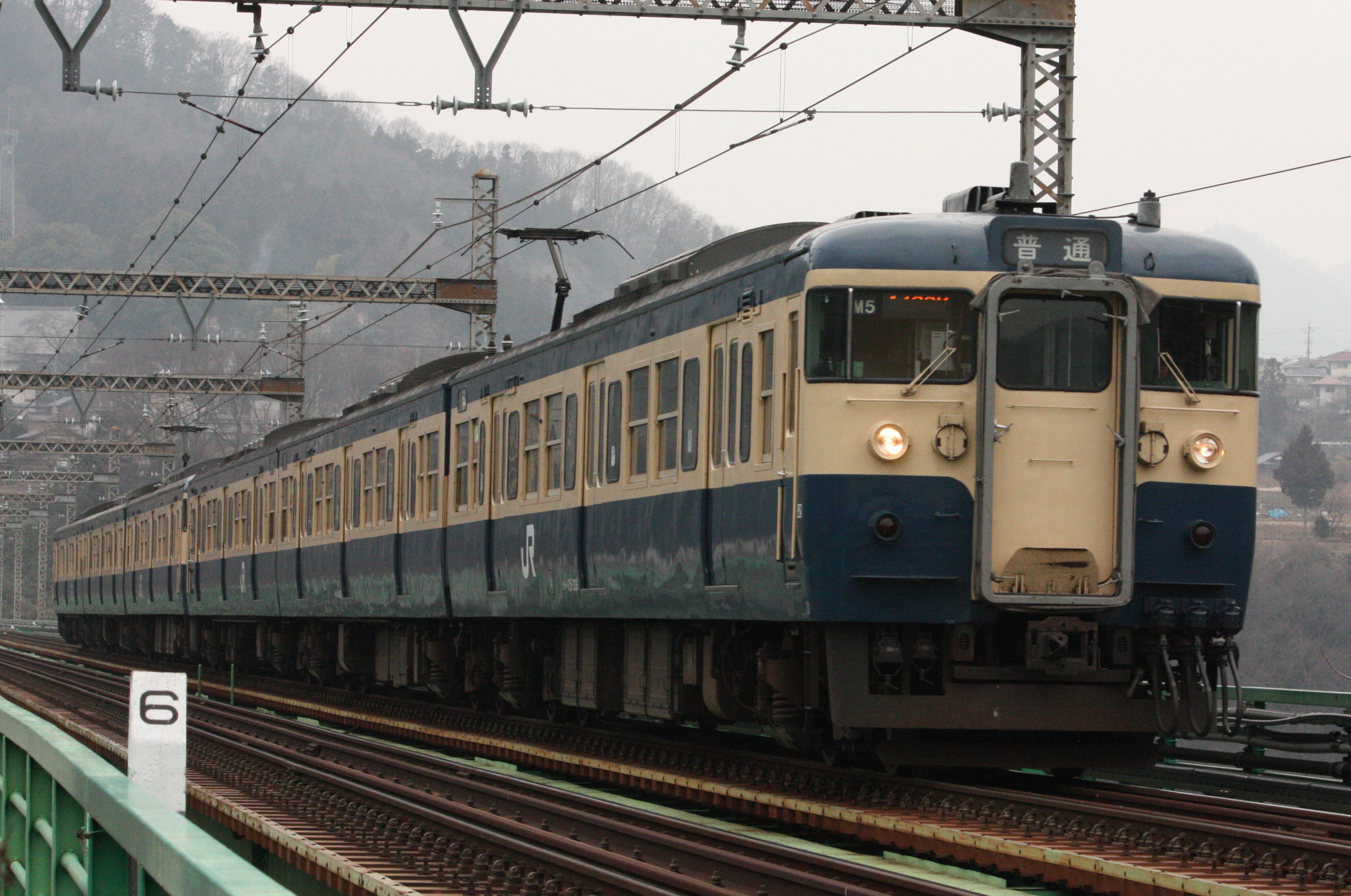 豊田車両センター115系 猿橋 - 鳥沢にて